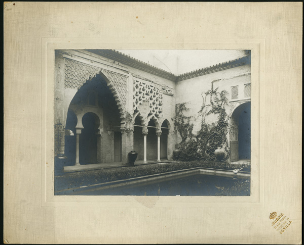 Fotografía, copia positiva. Patio del Yeso, Reales Alcazáres de Sevilla.